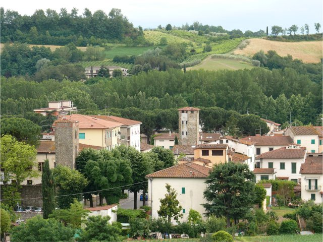 panorama di Terranuova Bracciolini